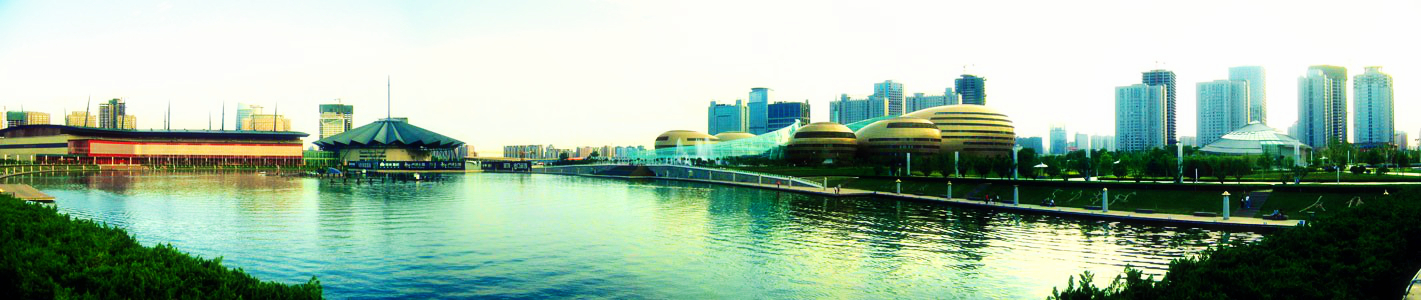 Zhengzhou new district